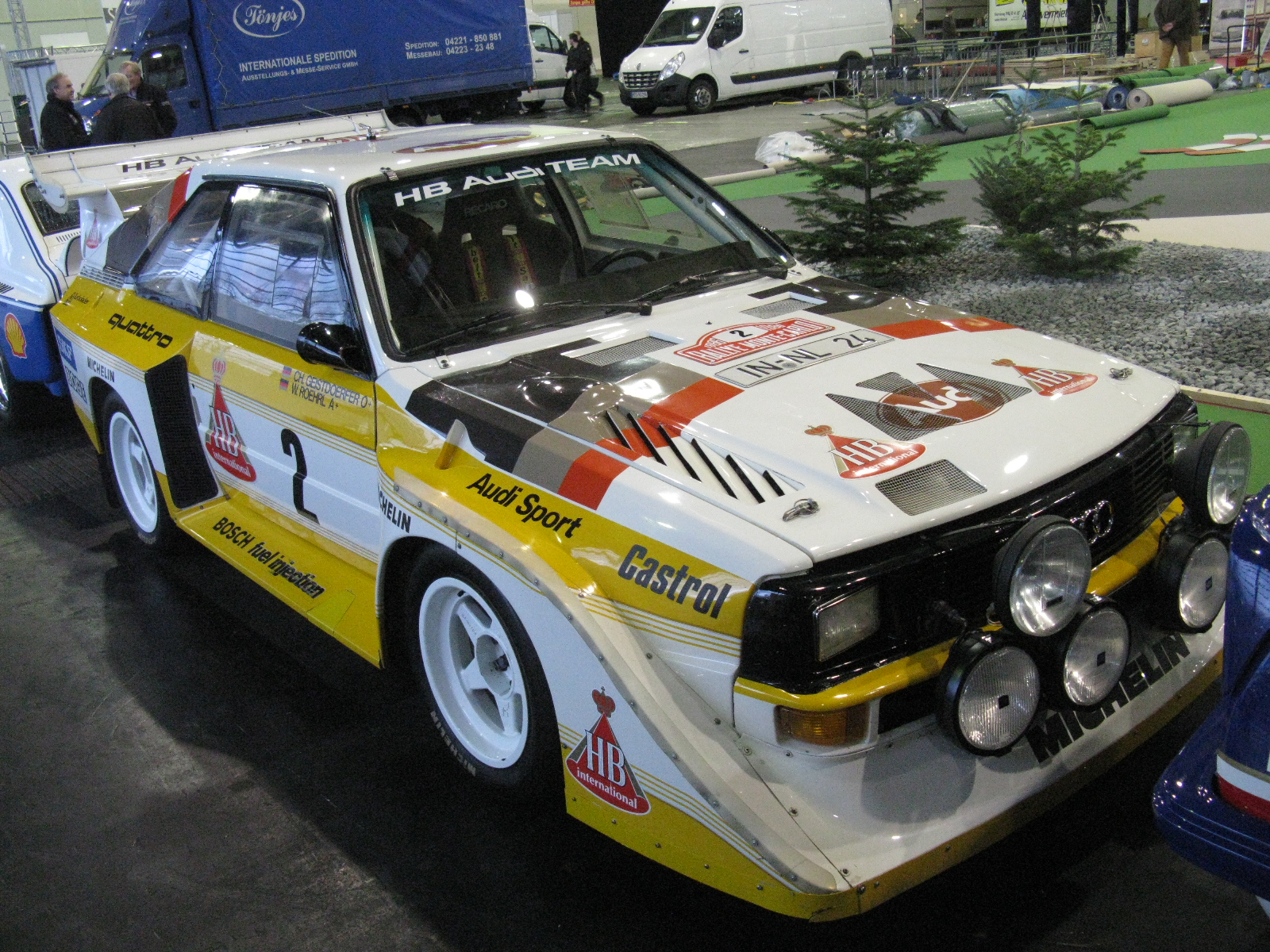 Audi Sport Quattro Rally